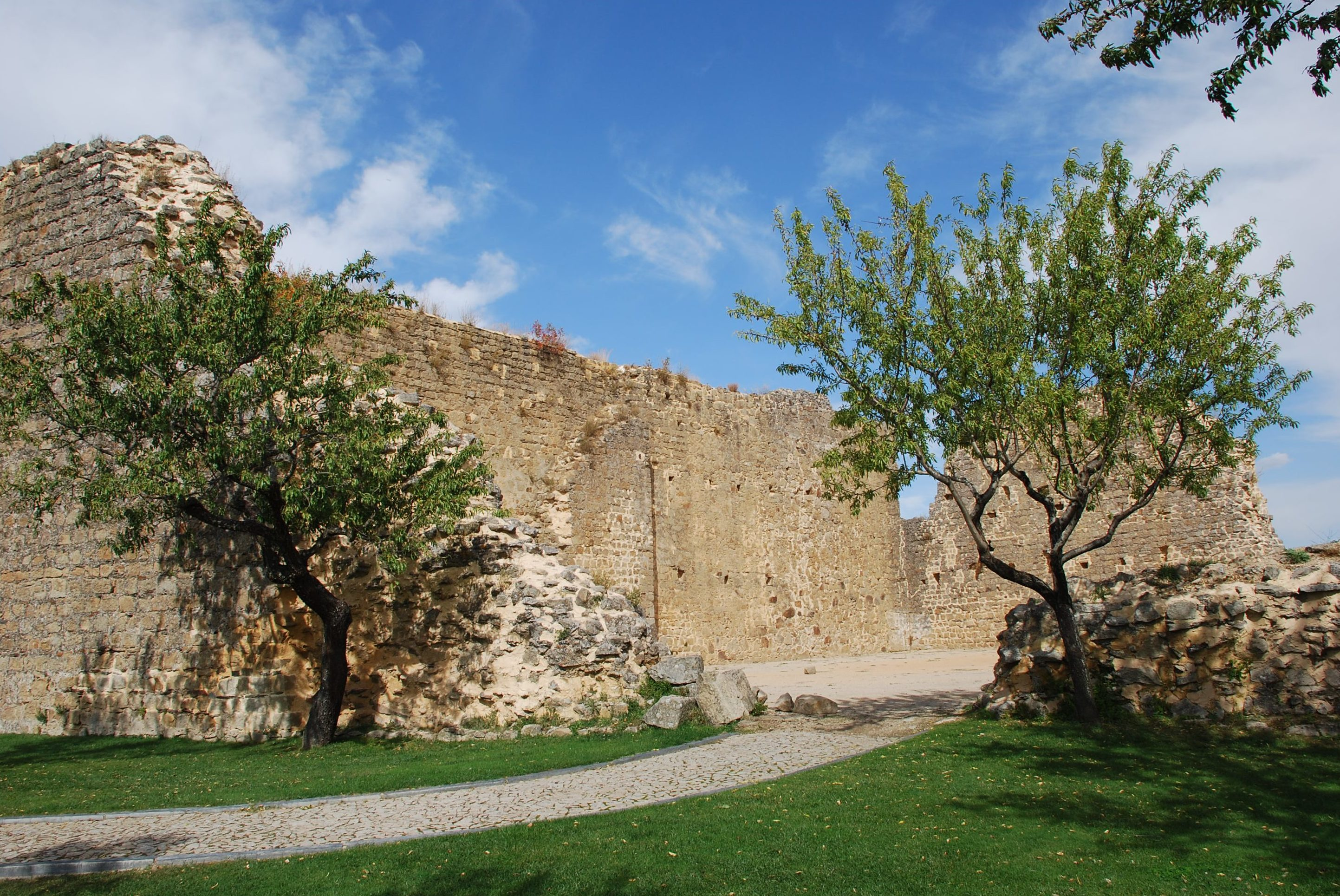 Castillo de Miranda do Douro